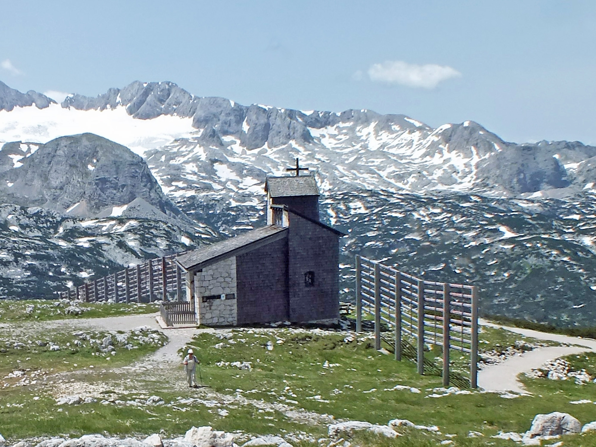 Die Bergkapelle auf dem Krippenstein